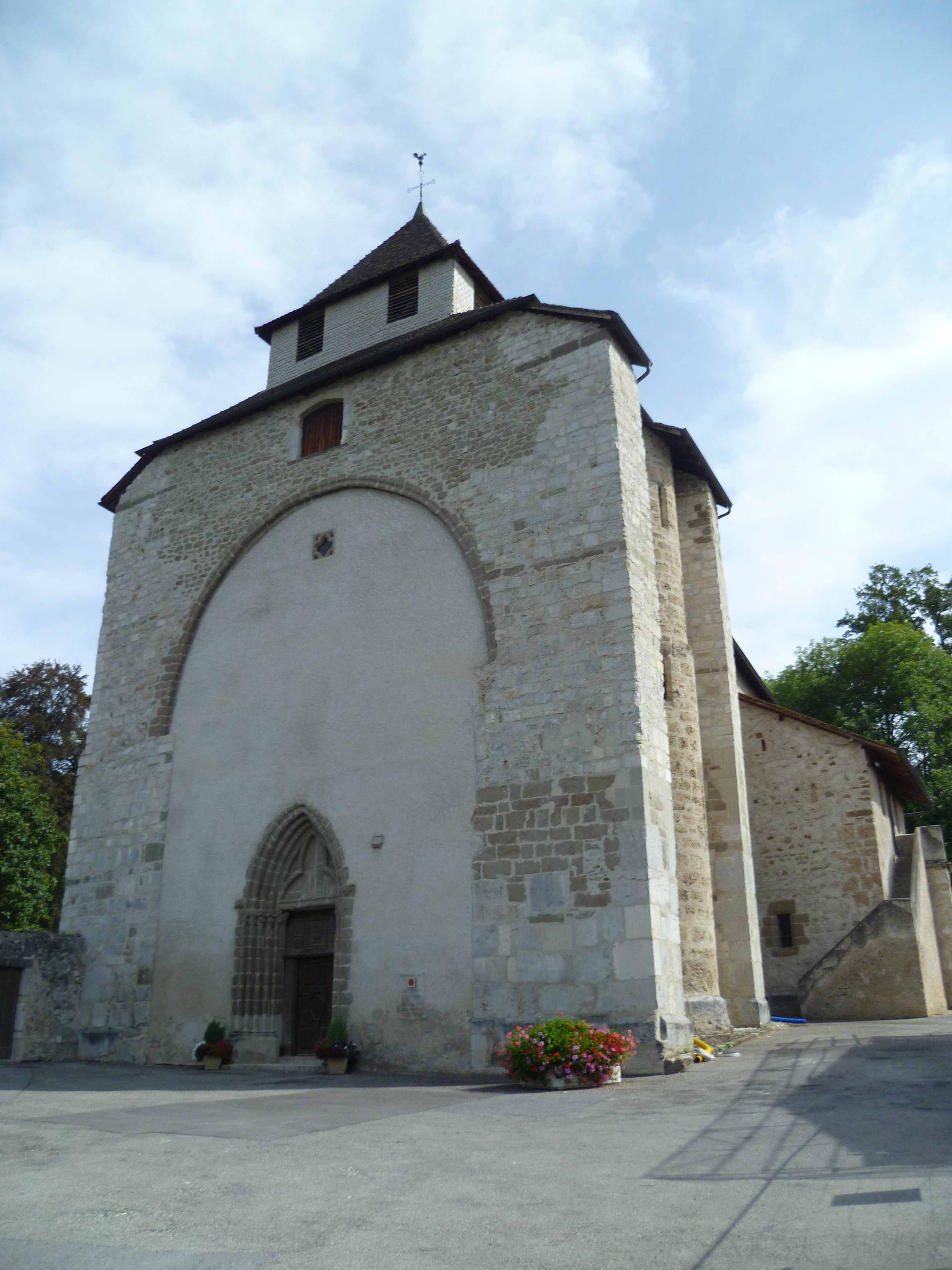 L'église de Contamine-sur-Arve, Haute-Savoie, France